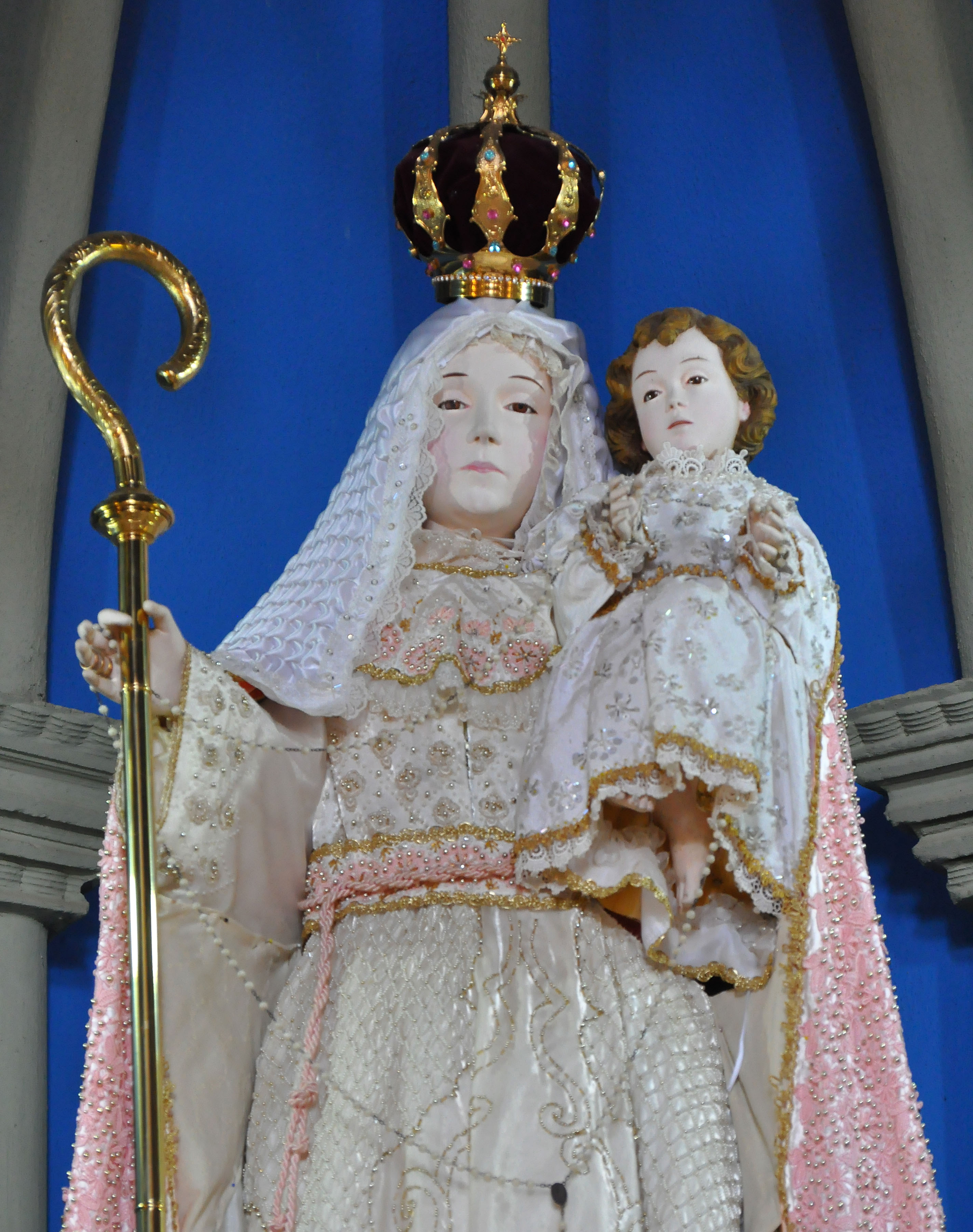 Nossa Senhora do Bom Sucesso